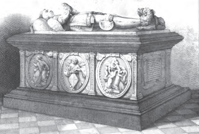 Charles de_Lallaing_Tombeau_vue_perspective_Lithographie_de_J._Lapotre_Douai